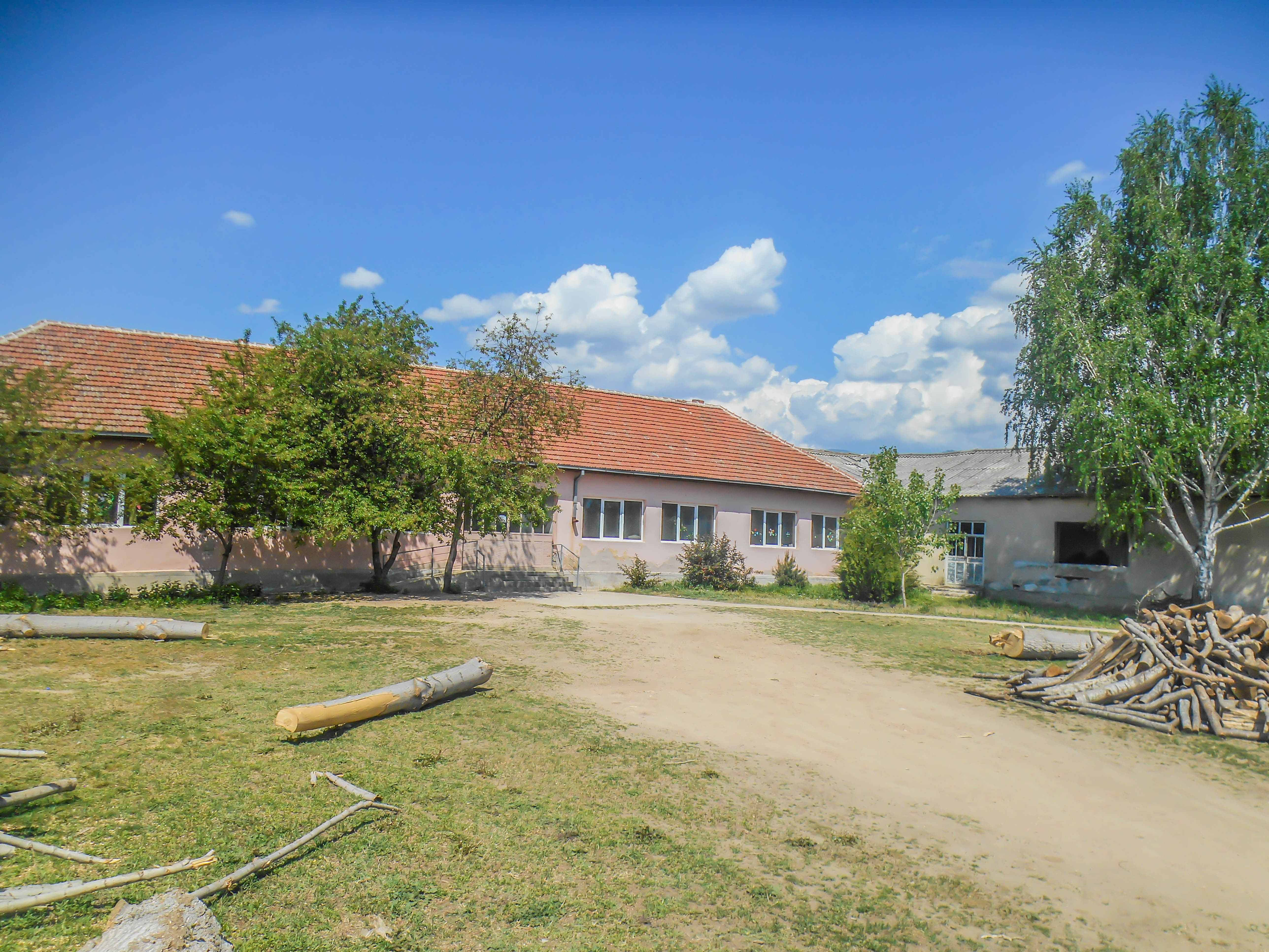 Основно училиште „Св. Кирил и Методиј“ - Секирник